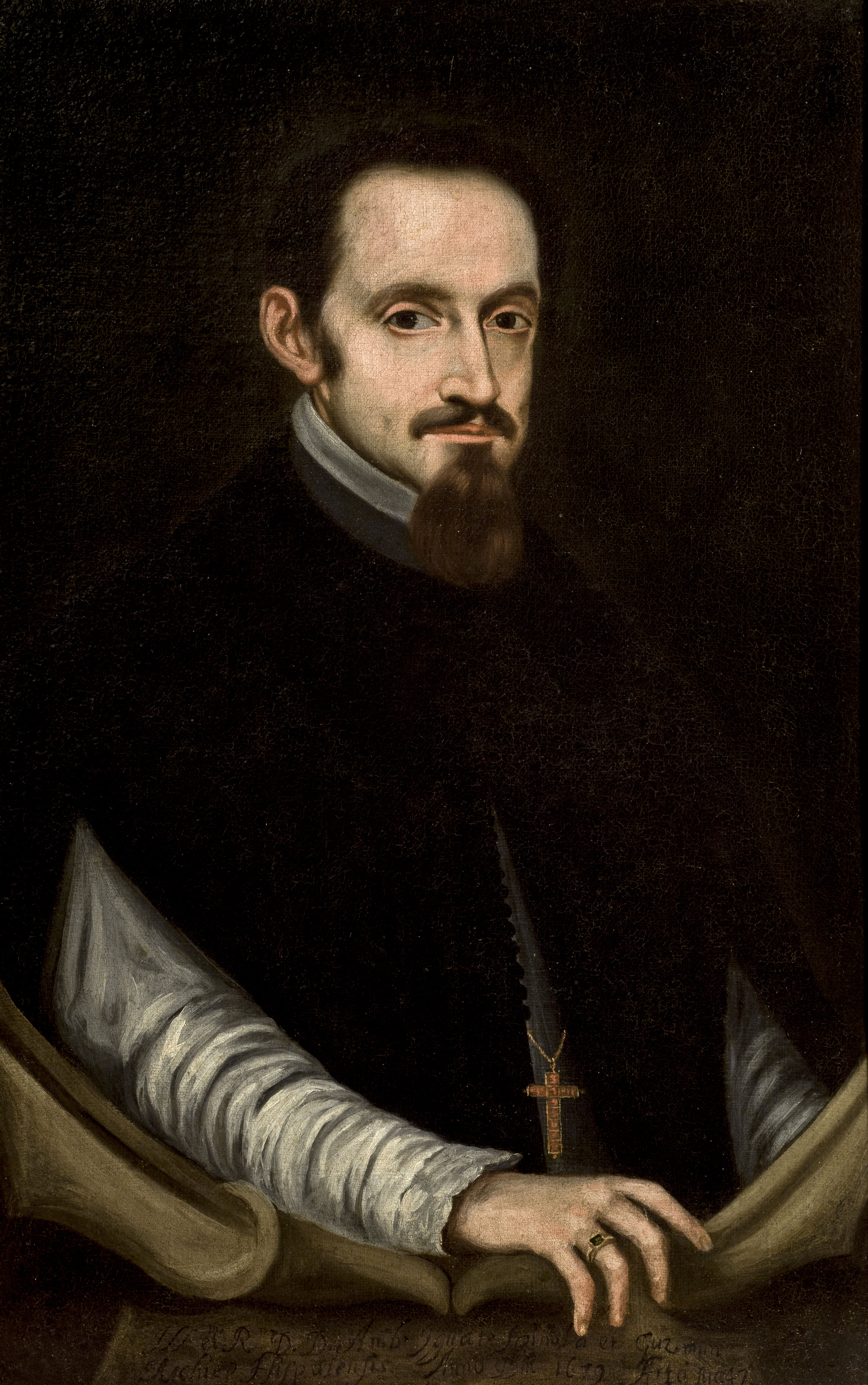 Retrato del prelado español Ambrosio Ignacio Spínola y Guzmán (1632-1684), que llegó a ser arzobispo de Sevilla y de Santiago de Compostela. Esta obra, que se conserva en el Ayuntamiento de Sevilla, es una copia pintada por el propio Pedro Núñez de Villavicencio del retrato original, que actualmente se conserva en una colección particular de Irlanda, aunque dicho autor hizo otras réplicas de esa obra como esta o como la que se conserva en el Museo Calvet de Avignon.